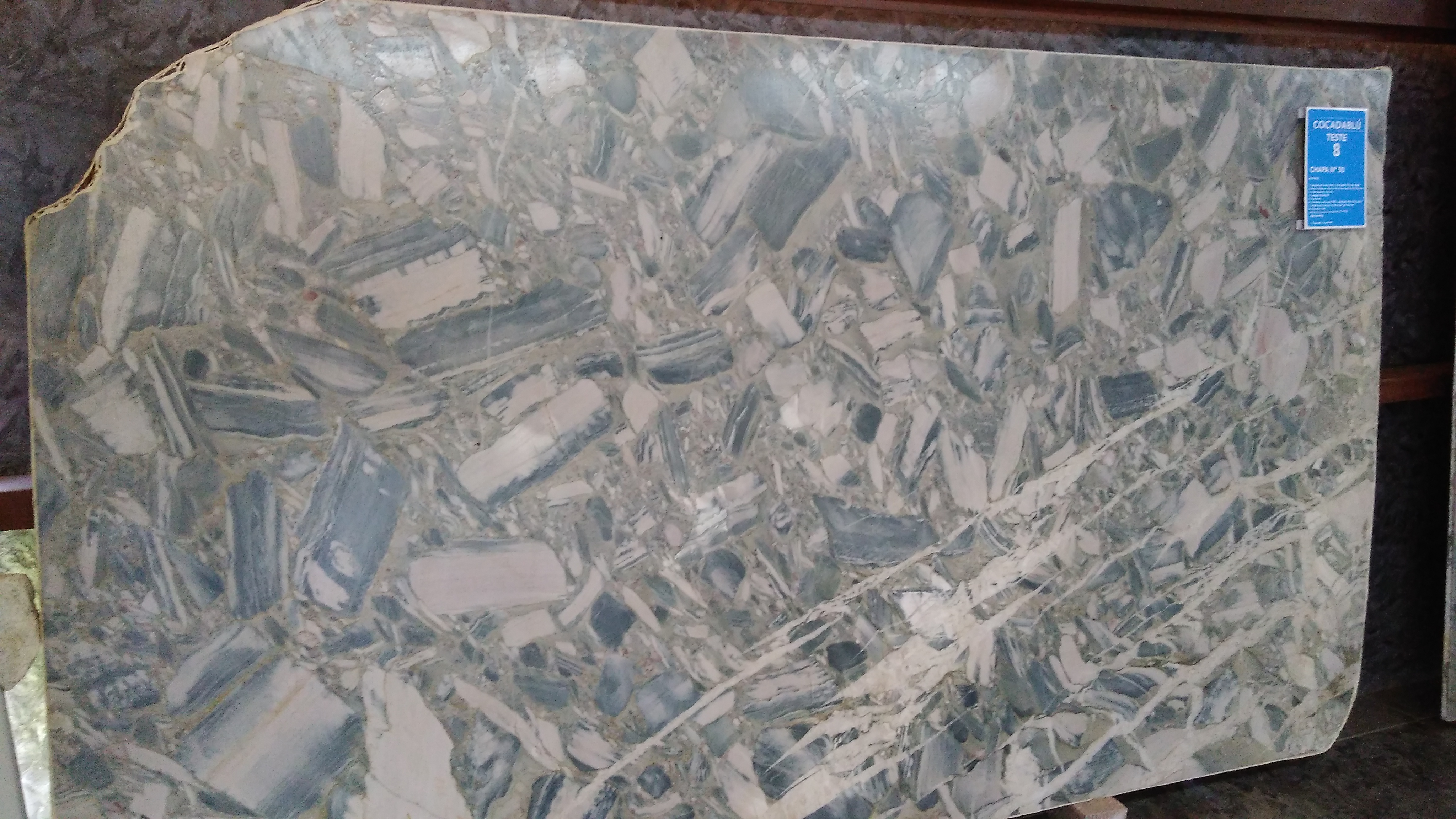 O Cocadablú é uma Rocha Natural formada por uma Brecha tectônica encontrada no interior do Estado da Bahia no Brasil e Extraído e comercializado pela empresa Super Clássico